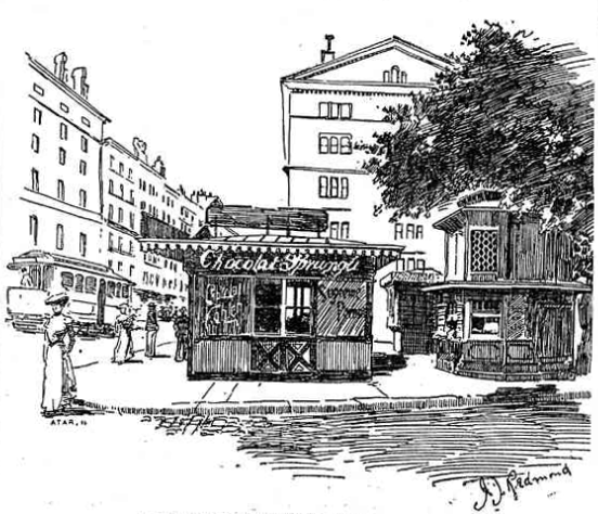 Place du Molard et Rues Basses à Genève en 1902. Kiosque de la Compagnie des tramways. Image illustrant un article paru dans le Journal de Genève du 25 août 1902. La fontaine du Molard a été déplacée début 1899 au centre de la place, le kiosque des tramways a été « reculé », pour occuper la place laissée libre par la fontaine. « Nous avons ainsi, maintenant, trois énormes kiosques entassés les uns sur les autres et cela est fort laid et incommode » (Journal de Genève du 2 juin 1899). « Nous avons vu surgir le chalet, soi-disant suisse, à l’usage des tramways et de leurs voyageurs, puis le kiosque à fruits, le transformateur électrique à deux étages » (Journal de Genève du 25 août 1902). Une fois ce kiosque démoli en 1953, la fontaine reprend sa place d’origine.